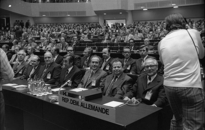 Helsinki, KSZE-Konferenz, DDR-Delegation ADN-ZB / Sturm / 30.7.1975 / Helsinki: Sicherheitskonferenz - Eröffnung der Tagung Die dritte und abschließende Phase der Konferenz über Sicherheit und Zusammenarbeit in Europa ist am Mittwochmittag in der Finlandia-Halle in Helsinki feierlich eröffnet worden. UBz: die Delegation der DDR die vom Ersten Sekretär des ZK der SED Erich Honecker (1.v.r.), geleitet wird. (Neben E. Honecker v.r.n.l. H. Axen, O. Fischer, S. Bock und H. Oelzner). [Finnland, Helsinki.- KSZE-Konferenz.- DDR-Delegation, vlnr: Heinz Oelzner, Siefried Bock, Oskar Fischer, Hermann Axen, Erich Honecker] Abgebildete Personen: Honecker, Erich: Staatsratsvorsitzender, Generalsekretär des ZK der SED, DDR (GND 118553399) Axen, Hermann: Politbüro des ZK der SED, Volkskammerabgeordneter, Friedensrat, DDR (GND 119328569) Fischer, Oskar: Minister für Auswärtige Angelegenheiten, SED, DDR Bock, Siegfried Prof. Dr.: Botschafter in Rumänien, DDR Oelzner, Heinz: Botschafter in Finnland und Dänemark, DDR